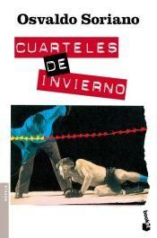 Cuarteles de invierno